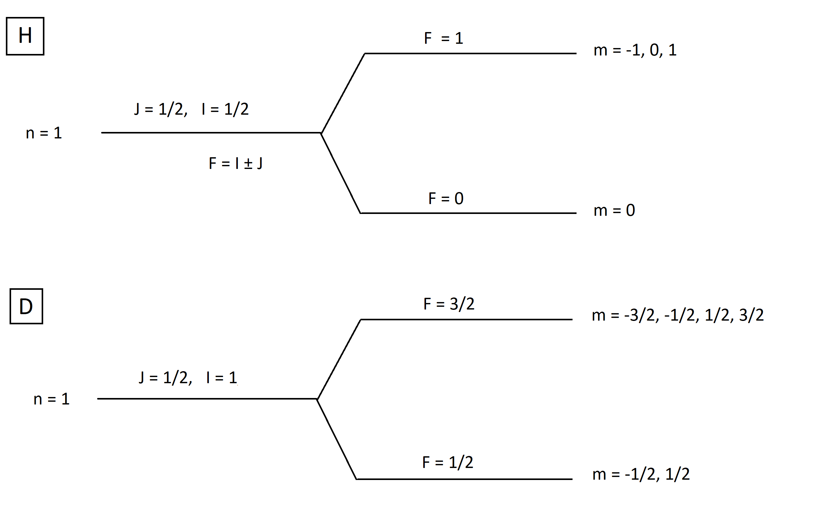 Хиперфину структуру основног нивоа атома водоника чине један синглет (m = 0) и један триплет (m = -1, 0, 1), док хиперфину структуру атома деутеријума чине један дублет (m = -1/2, 1/2) и један квадруплет (m = -3/2, -1/2, 1/2, 3/2).